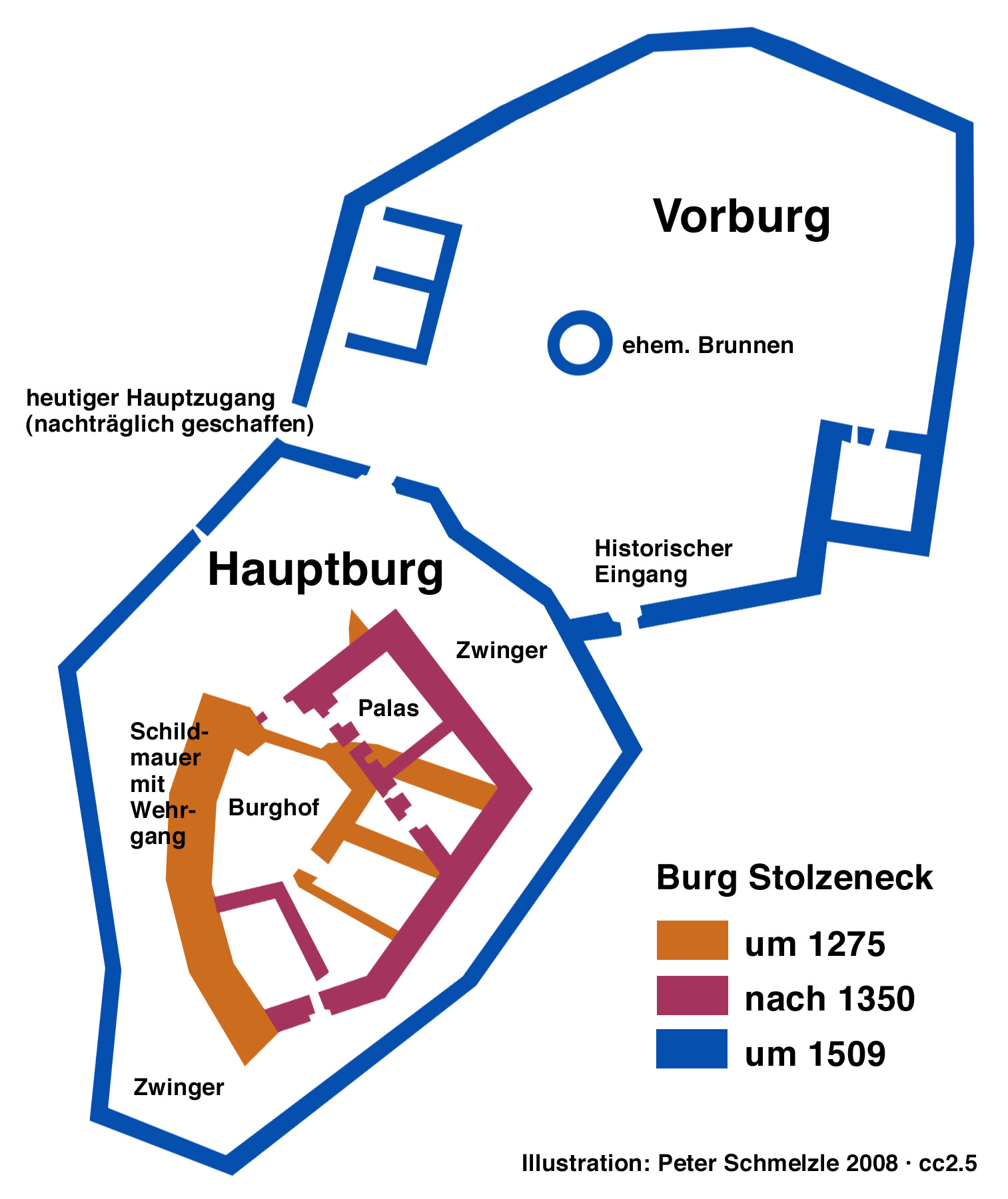 Burg Stolzeneck am Neckar, nach Norden ausgerichteter Plan mit Datierung der Gebäudereste und Fundamente, die aus unterschiedlichen Epochen stammen.